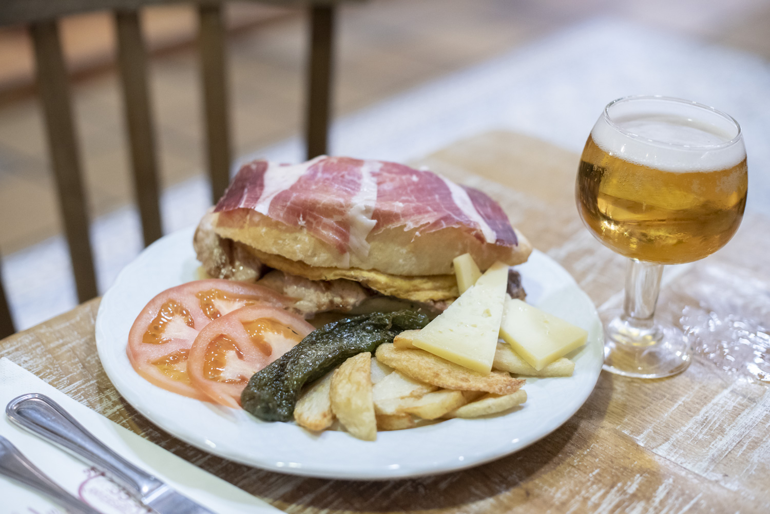 Serranito de Punta de Solomillo con patatas fritas y acompañado de queso en uno de los locales de Mesones del Serranito de Sevilla